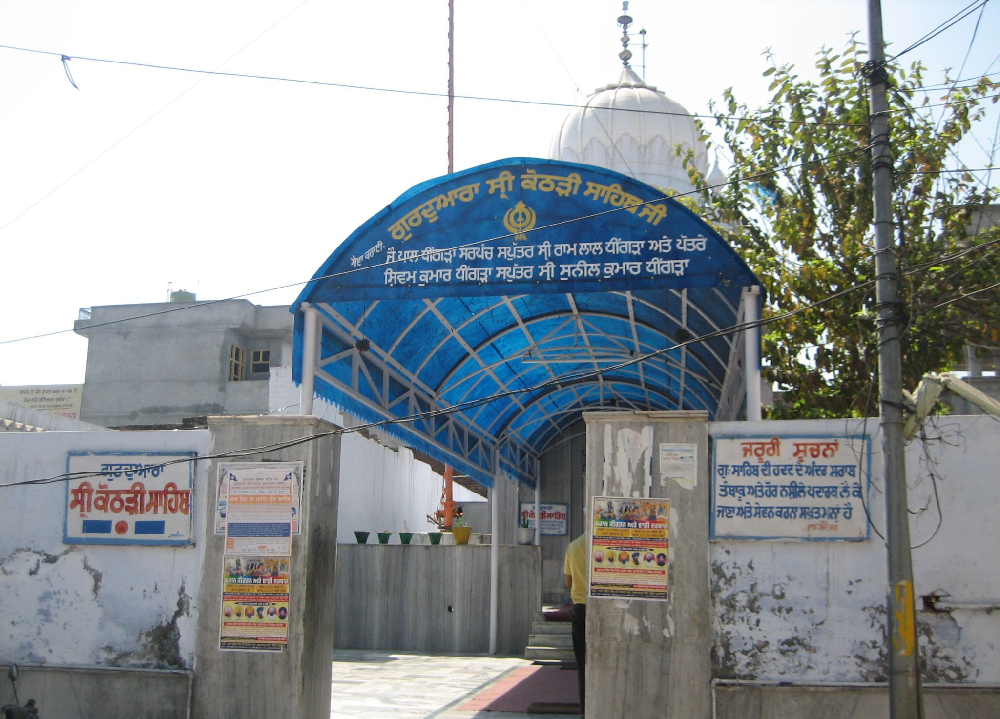 Gurudwara Shree Kodri Sahib